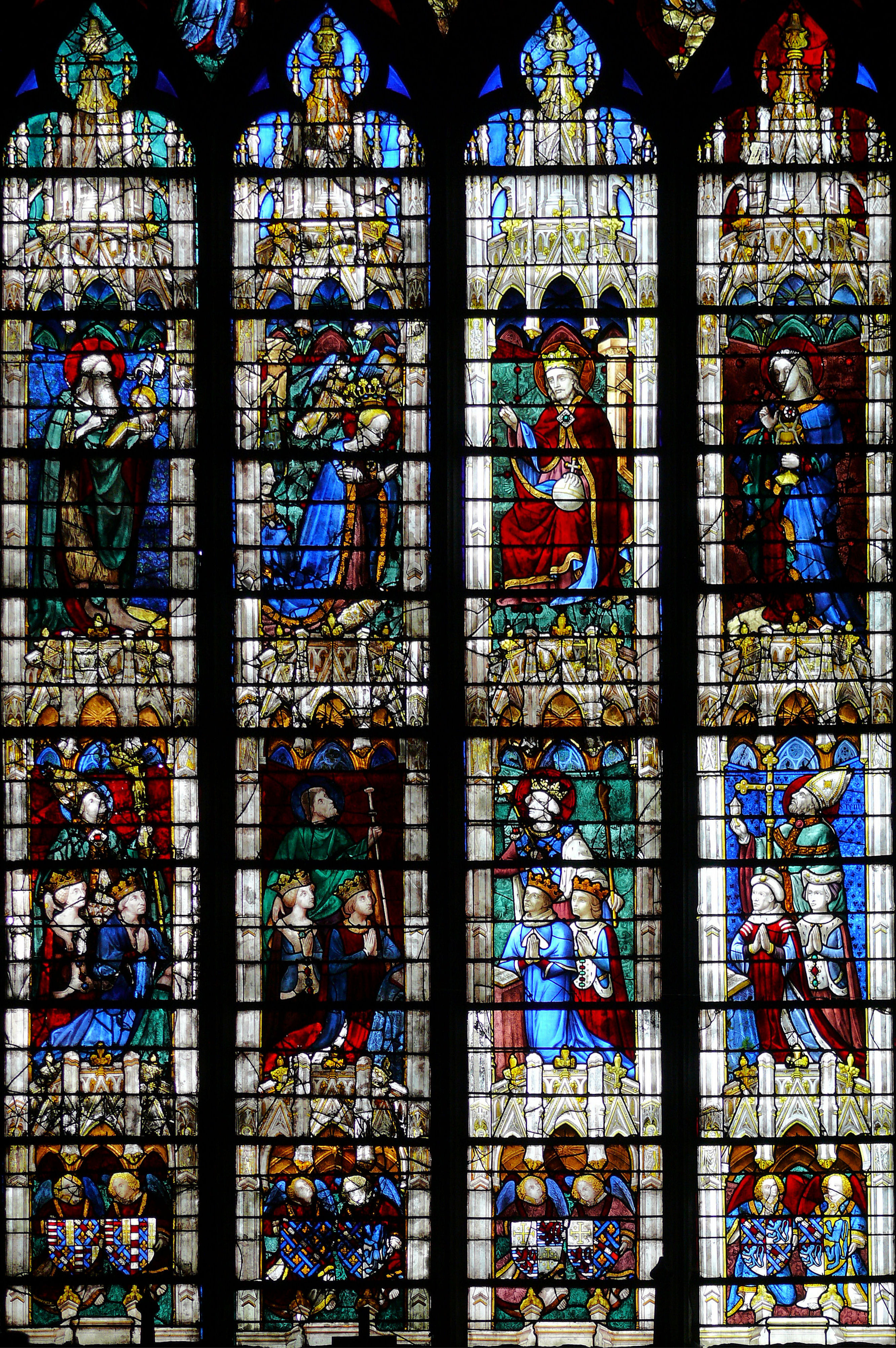 Cathédrale de Chartres - Vitraux de la chapelle Vendôme